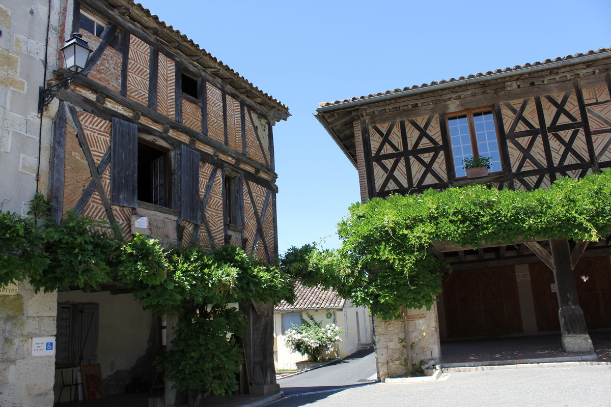 Bastide du XIIIème siècle